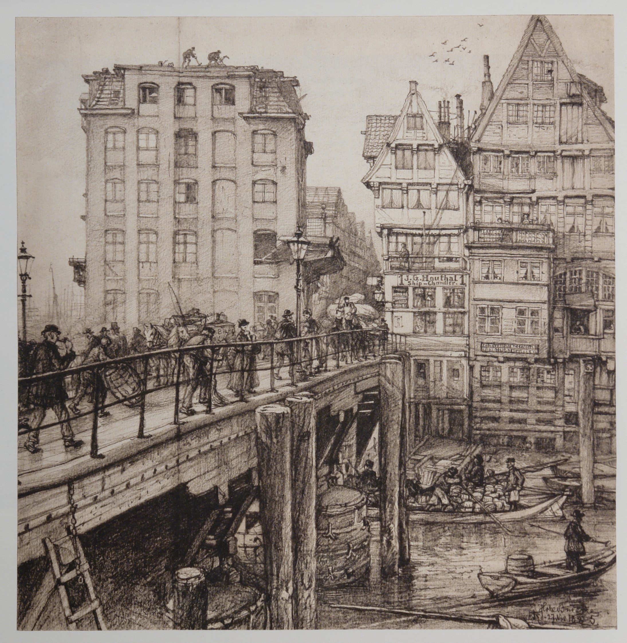 HAMBURG. Augenblicke einer Stadt 1882-1894. In 50 Zeichnungen von Johann Theobald Riefesell nach Originalen im Museum für Hamburgische Geschichte. Hohe-Brücke-2-Deichstrasse 08-02-1884